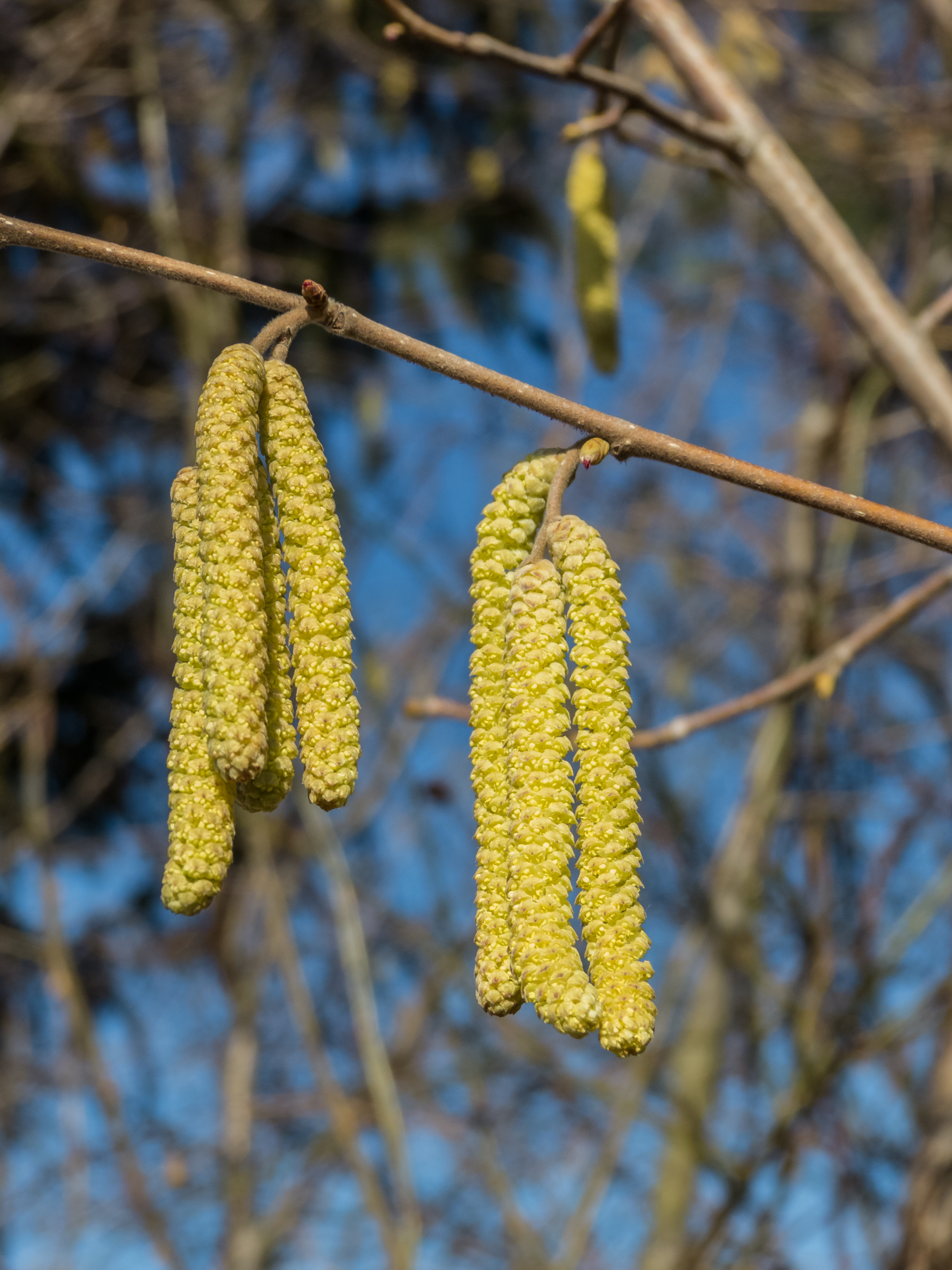 Frühlingsboten im Februar in Rheinland-Pfalz, Deutsche Weinstrasse